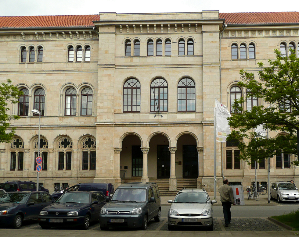 Archivstrasse 2 in Hannover